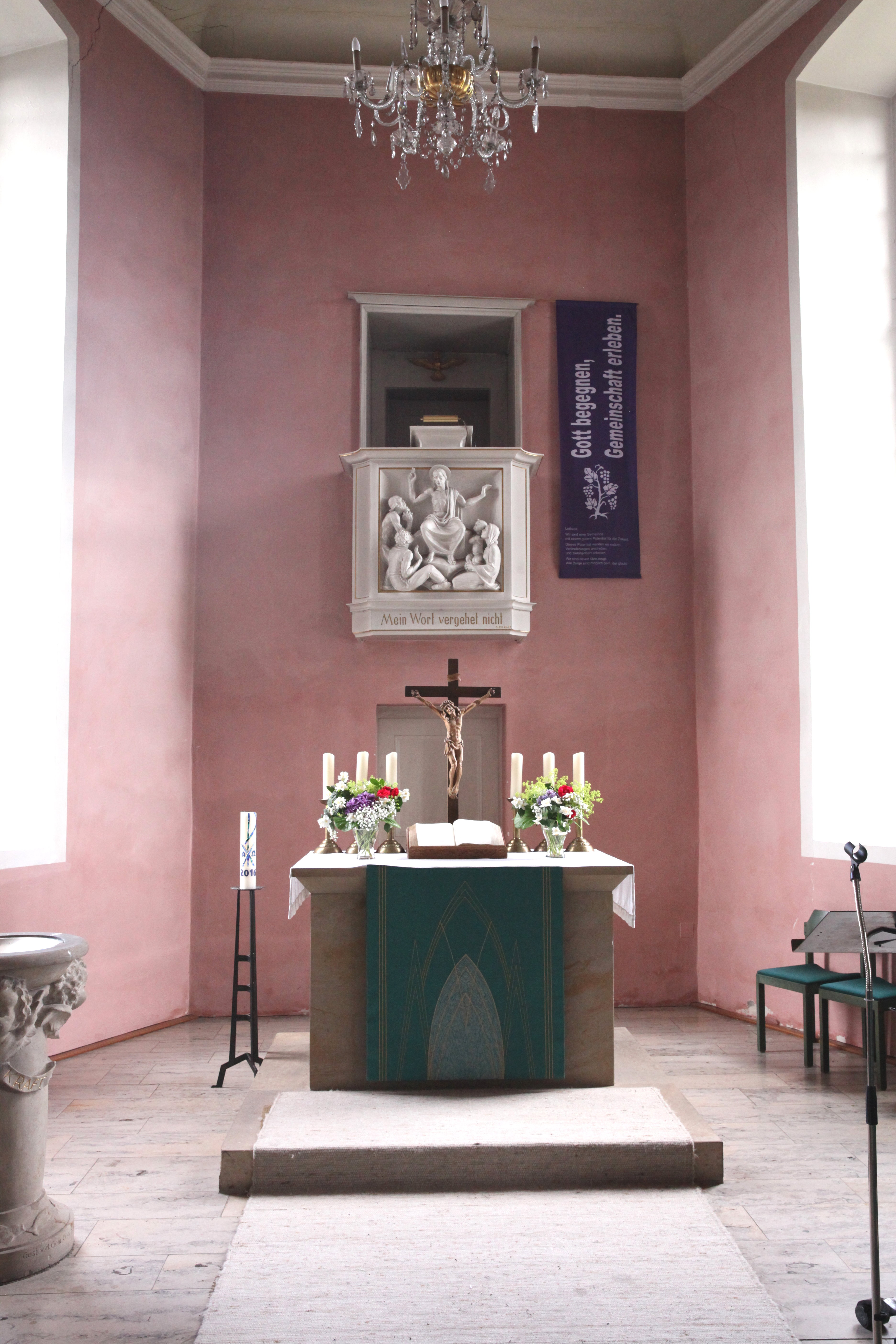 Altar und Kanzel, Evangelische Kirche St. Nikolaus in Weitramsdorf